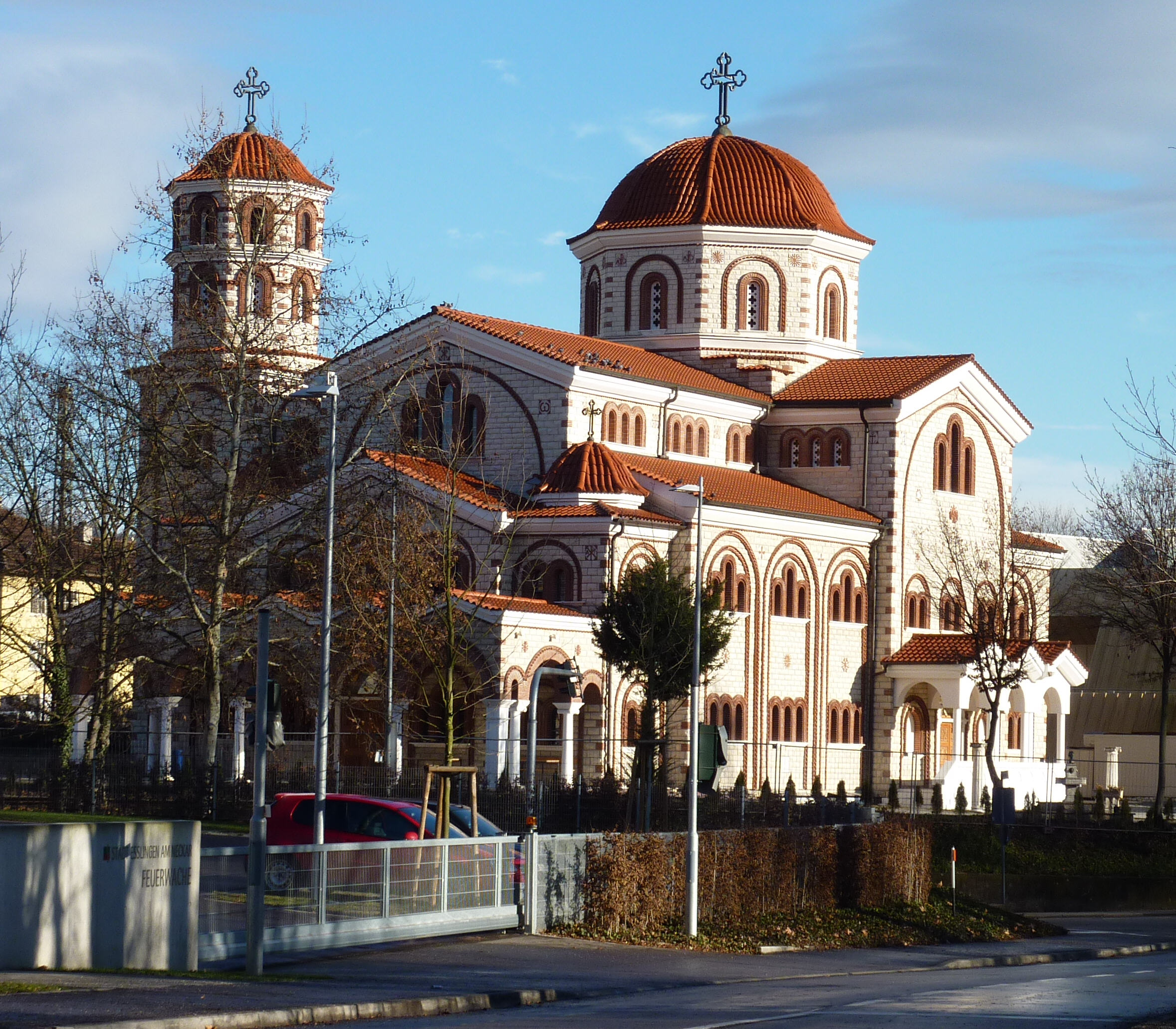 griechisch-orthodoxe Kirche in Esslingen am Neckar